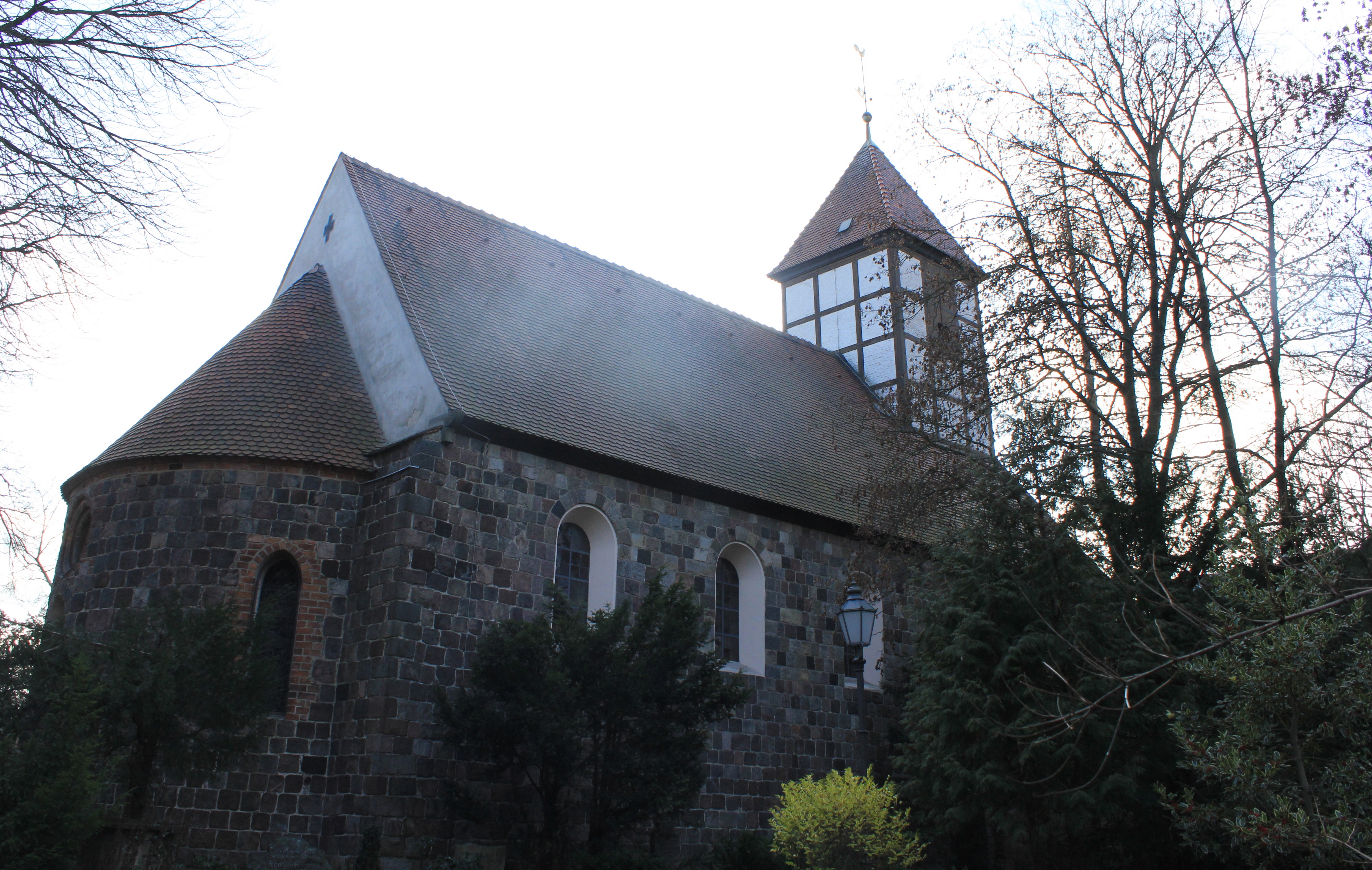 Dorfkirche Tempelhof 2. Viertel 13. Jh., 1954-56 von Wolfram Konwiarz